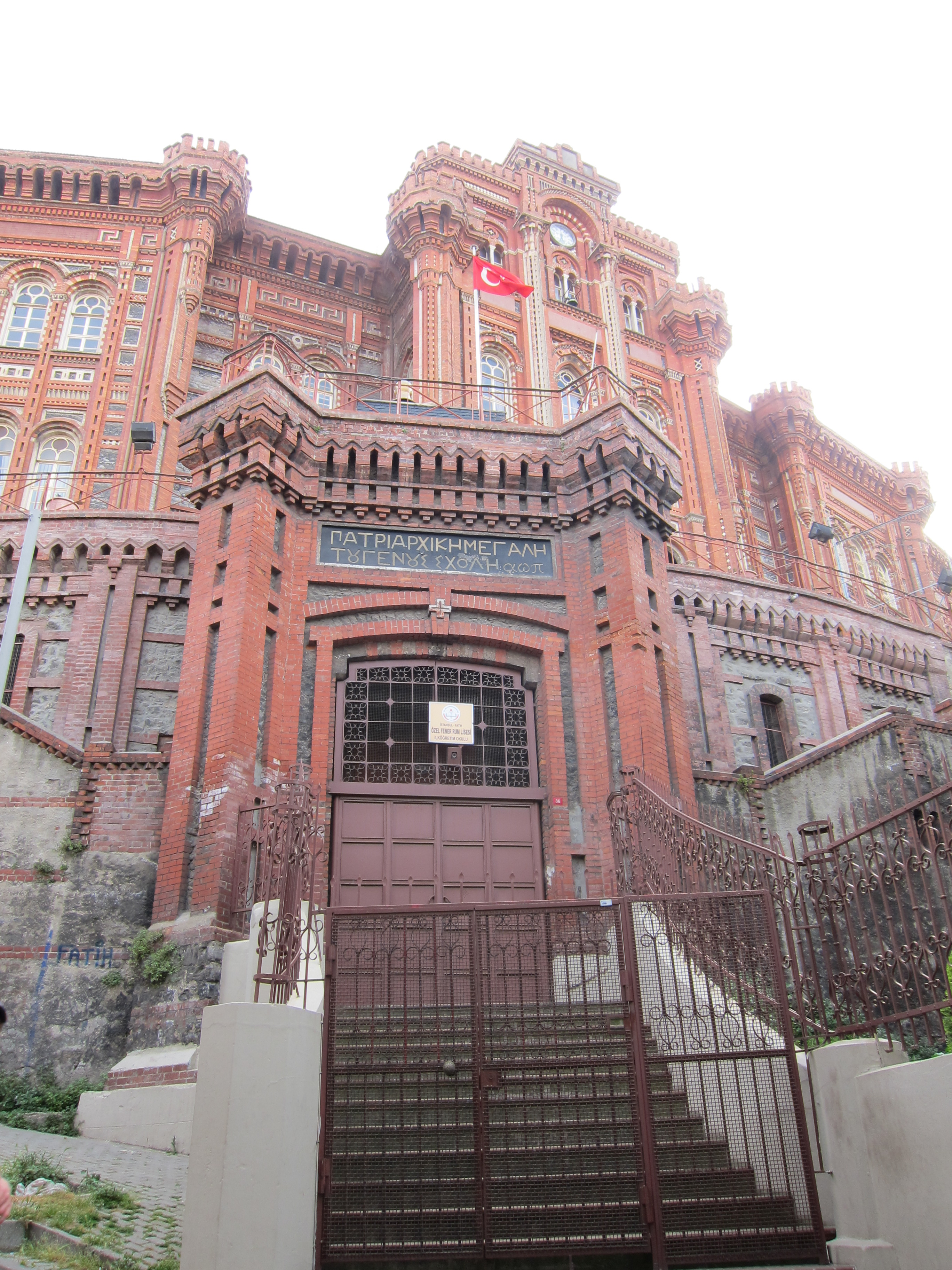 Великая школа нации на Фанаре. Вход